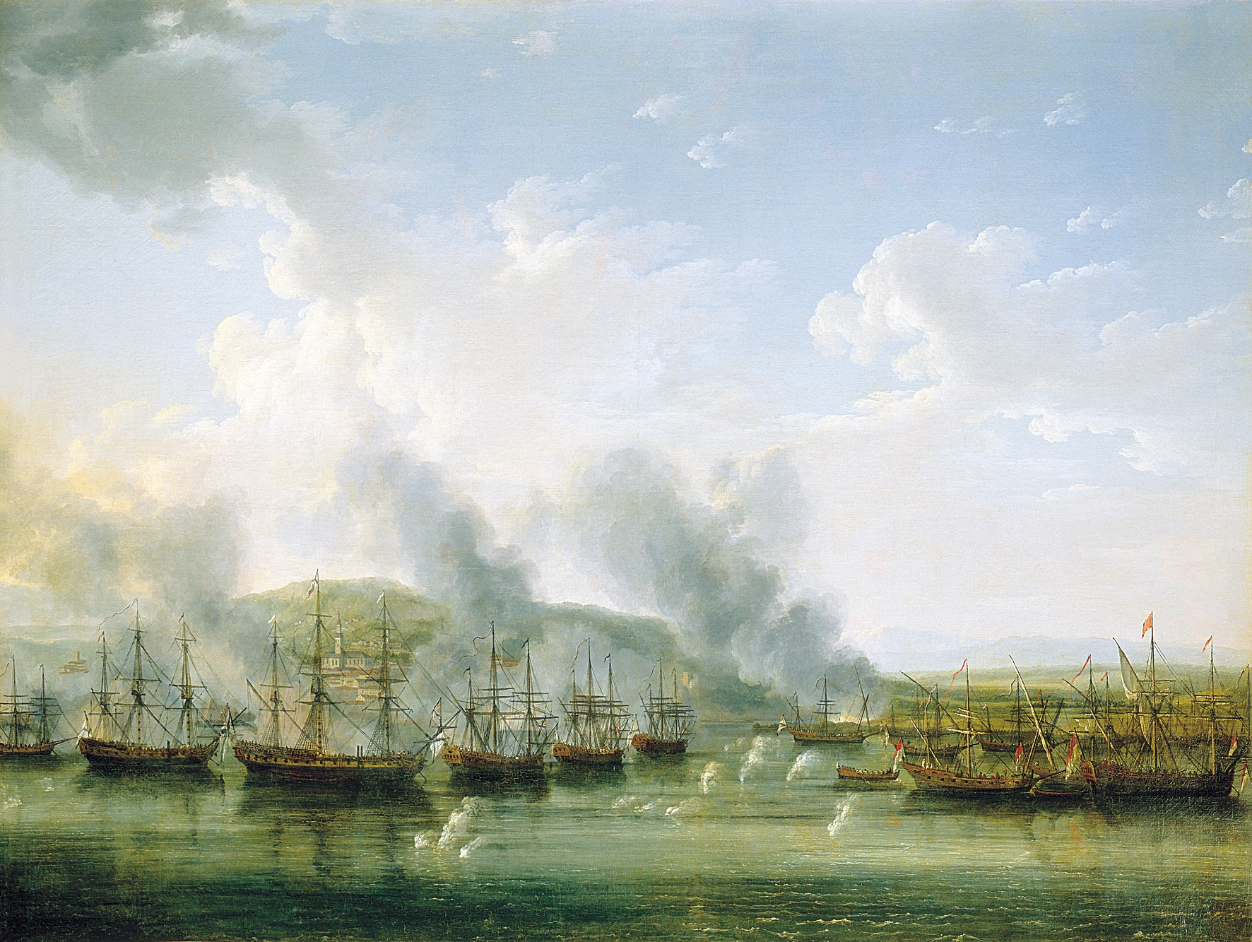 Это картина немецкого художника Якоба Филиппа Гаккерта «Сражение русского флота с турецким у крепости Дамиетта 21 октября 1772 года». Картина написана специально для Чесменского зала Большого Петергофского дворца в 1775 году. На картине описаны события Первой Архипелагской экспедиции русского флота — морского сражения у египетского города Дамьетта 21 октября 1772 года. Описание картины. На переднем плане — всплески от пушечных ядер, на втором — русские корабли, прошедшие в центр турецкой флотилии. Часть неприятельских судов отсечена от крепости (справа у края картины), оставшиеся у берега охвачены пожаром. Очертания крепости, затянутой полосой дыма, почти не видны.